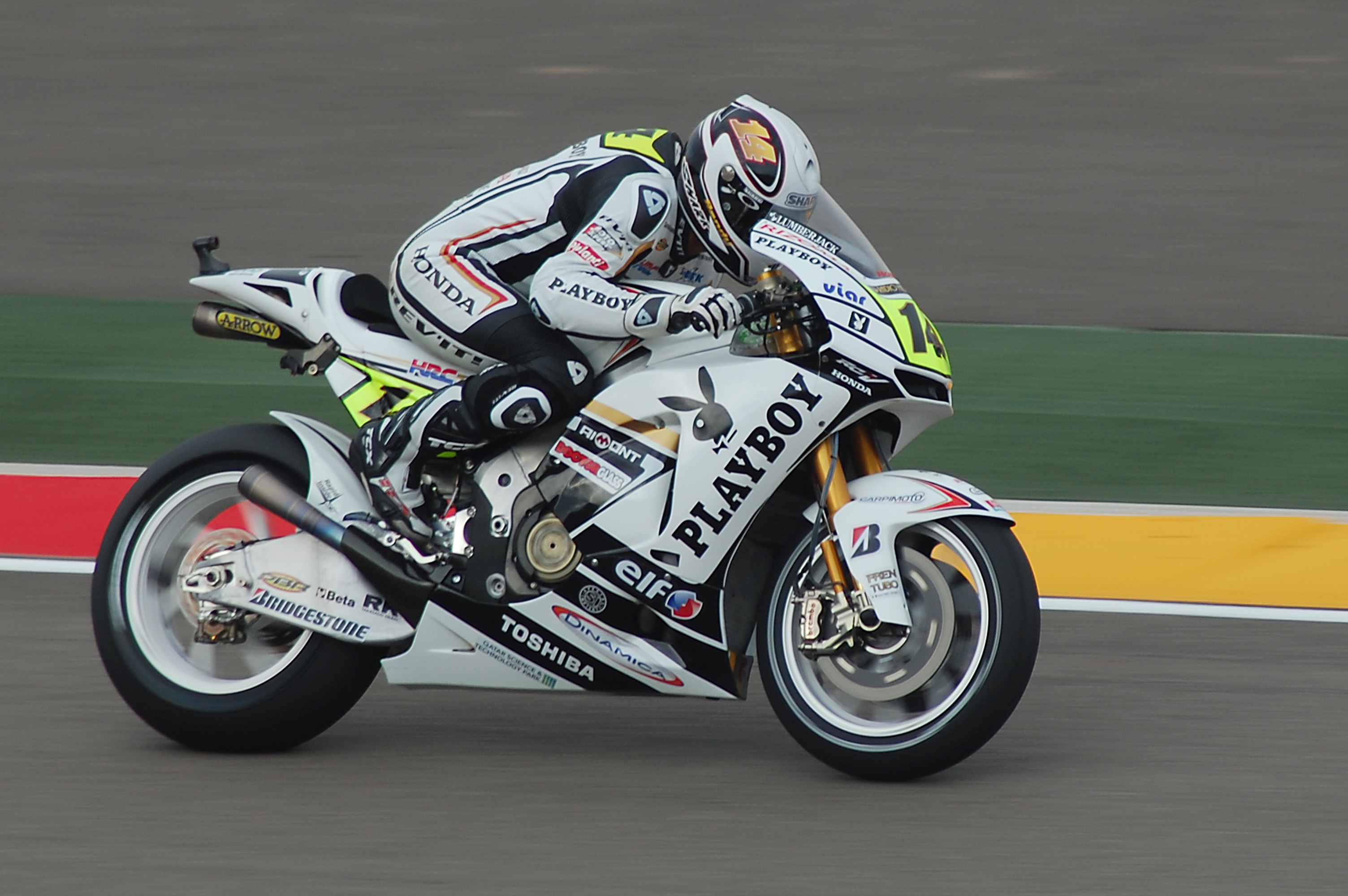 Randy de Puniet en Motorland, Gran Premio de Motociclismo de Aragón.